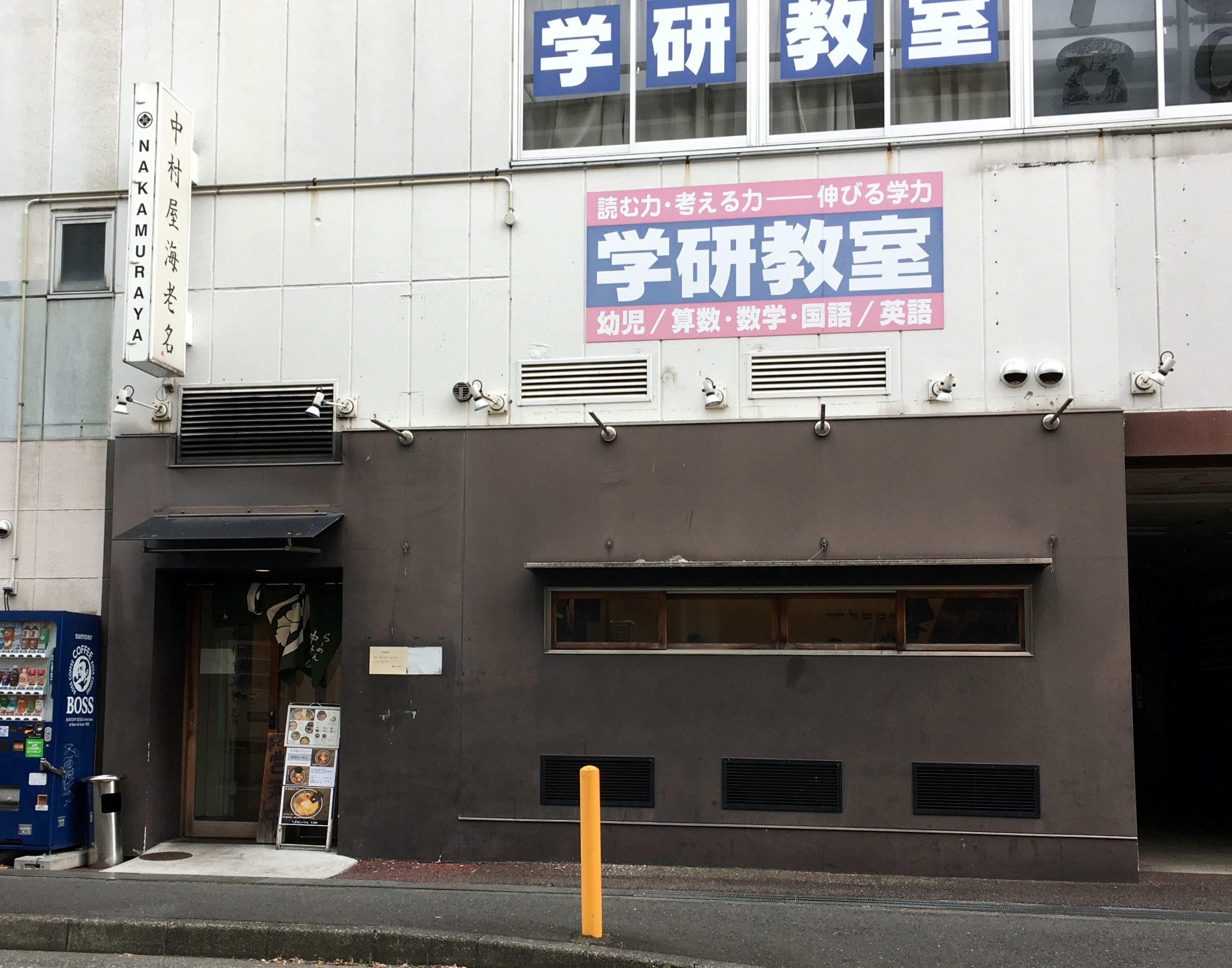 中村屋（海老名のラーメン店）